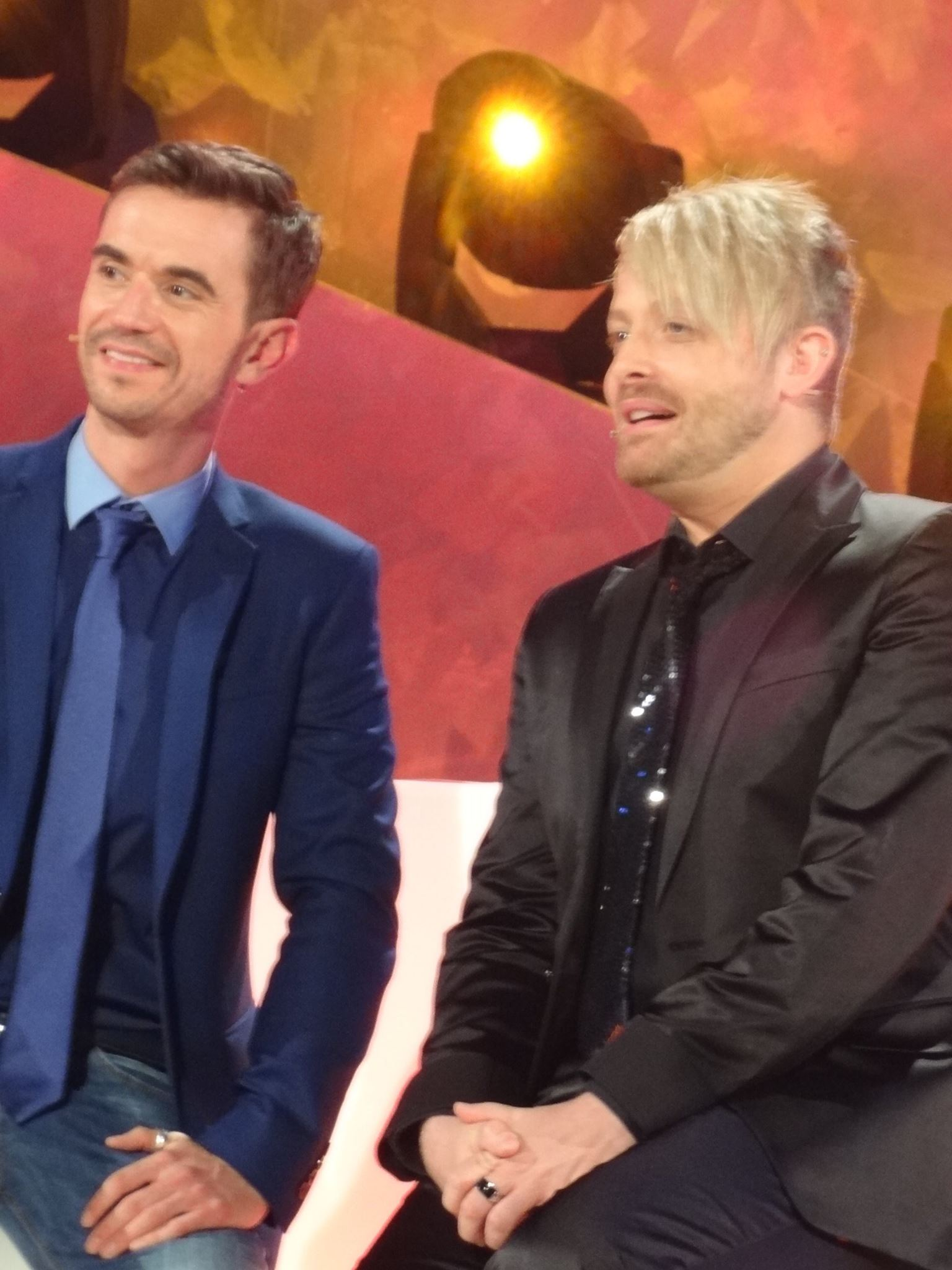 Florian Silbereisen und Ross Antony in Silbereisens Show „Die Besten im Frühling“